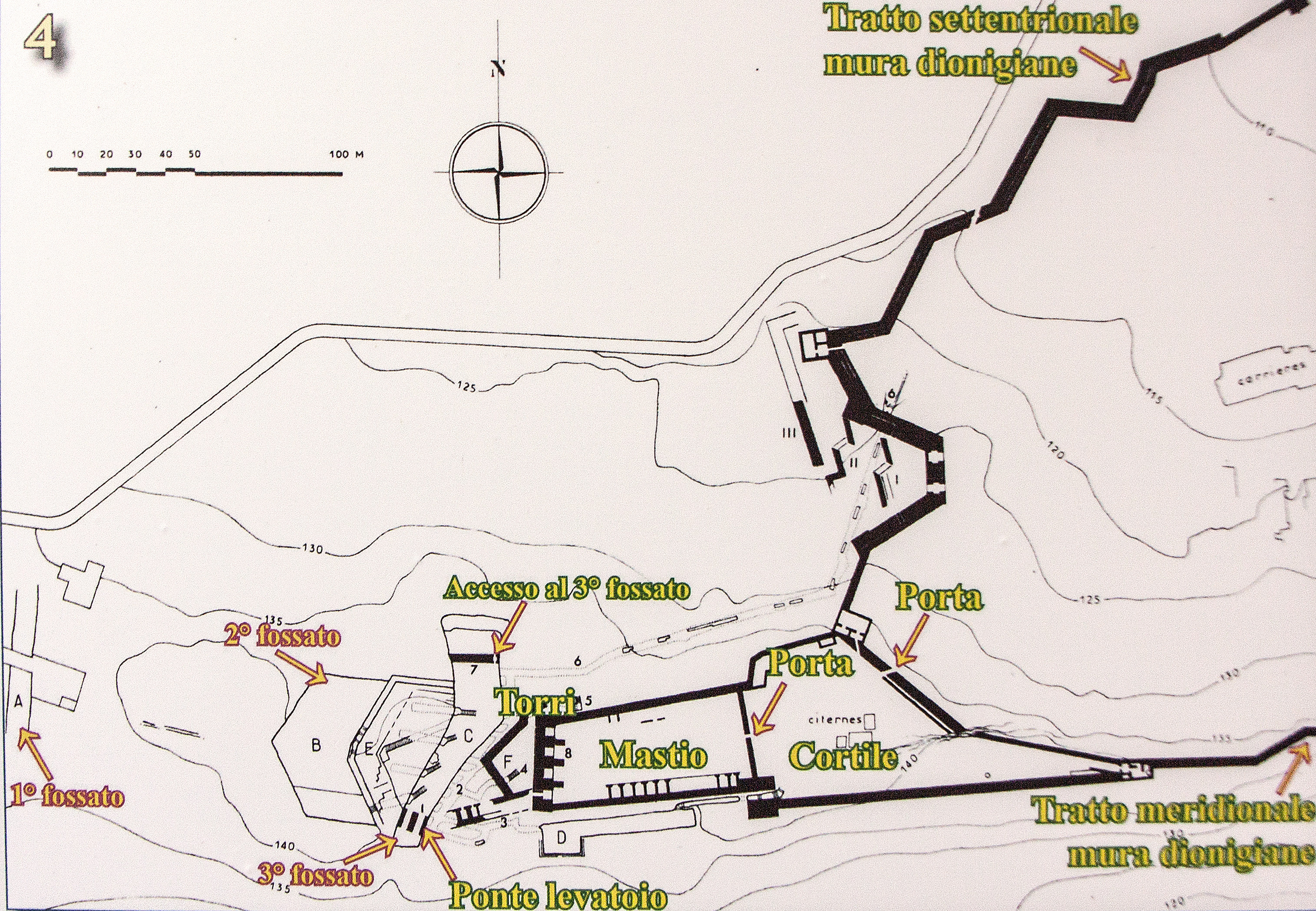 Schema del Castello Eurialo. Elaborazione di Elisa Bonacini da J.P. Adam, Archivio Soprintendenza di Siracusa, 1972